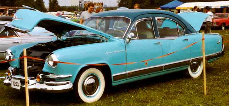 Kaiser Manhattan 4-Door Sedan 1953